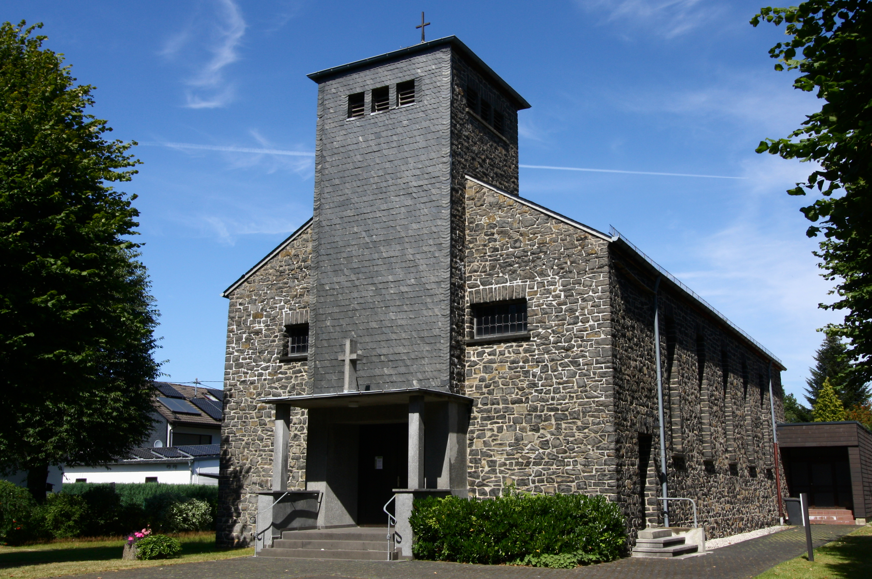 Kirche St. Wendelin, Ailertchen, Westerwald, Rheinland-Pfalz, Deutschland